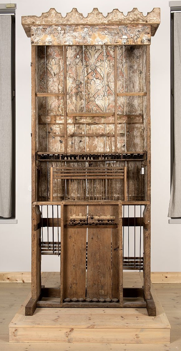 Norrlandaorgeln. Statens historiska museum, inventarienummer 12910.